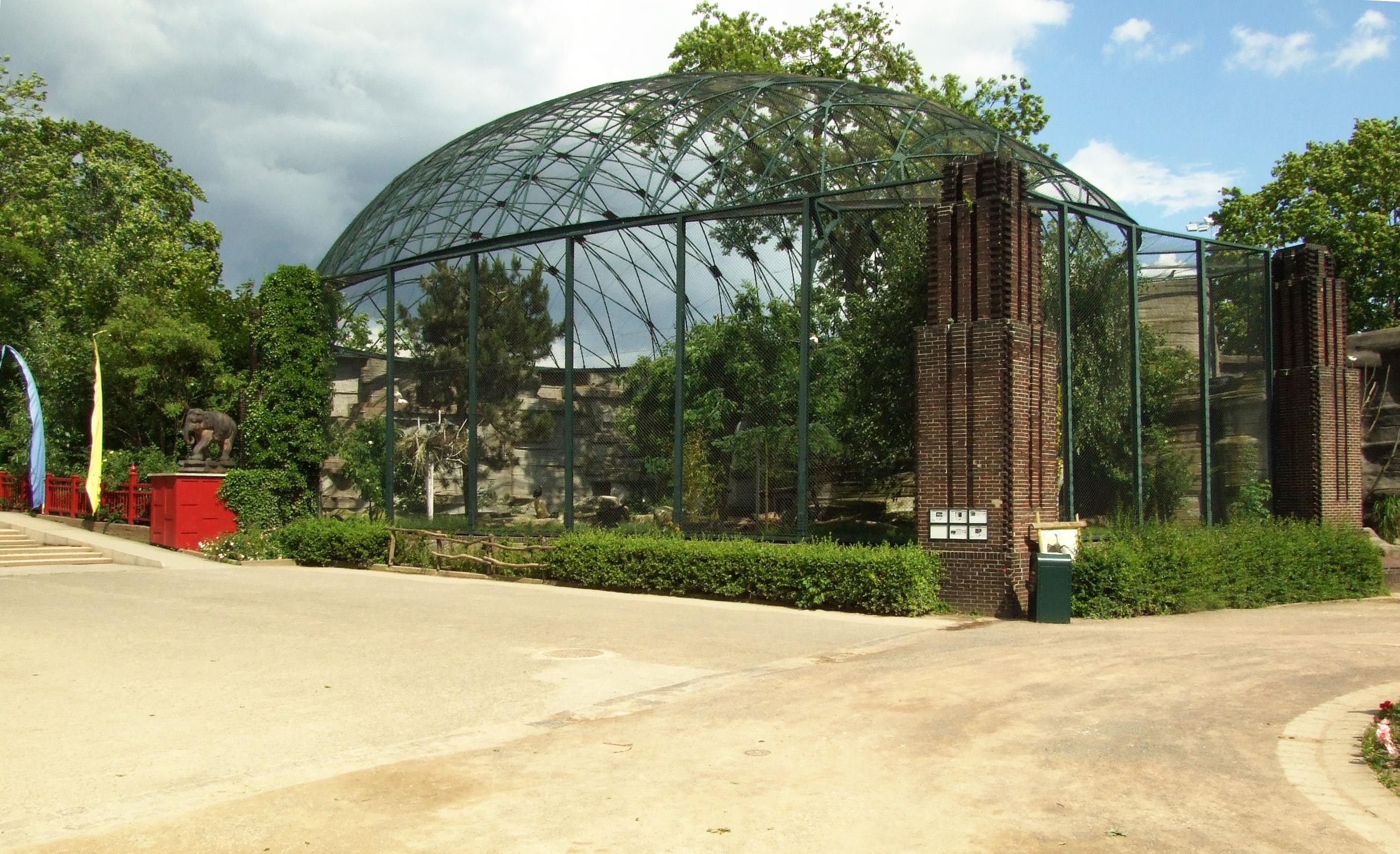 Große Vogelvoliere im Zoo Leipzig